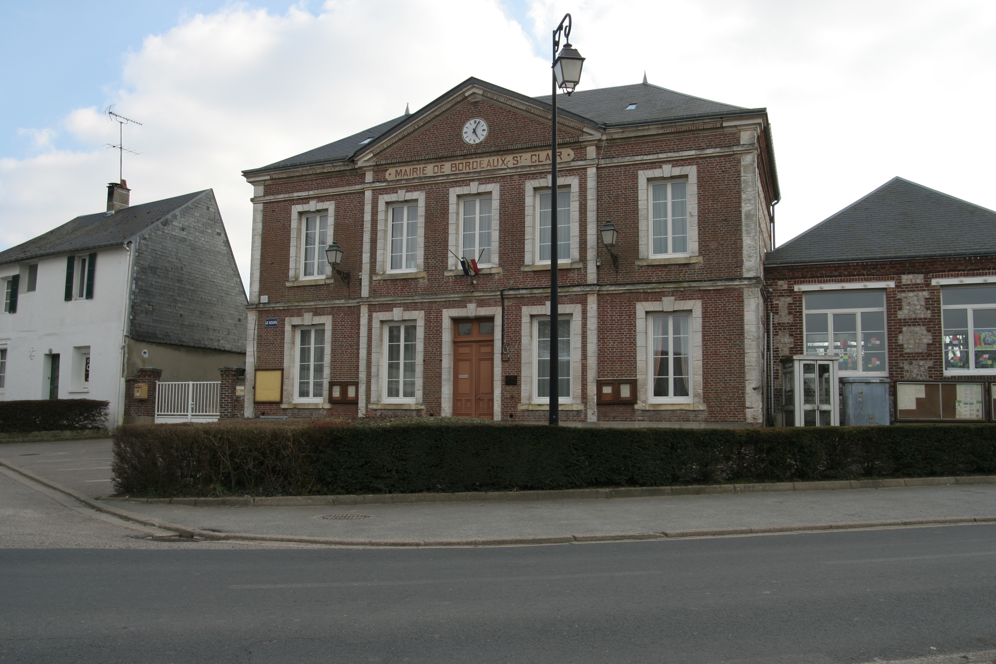 Mairie de Bordeaux-Saint-Clair.